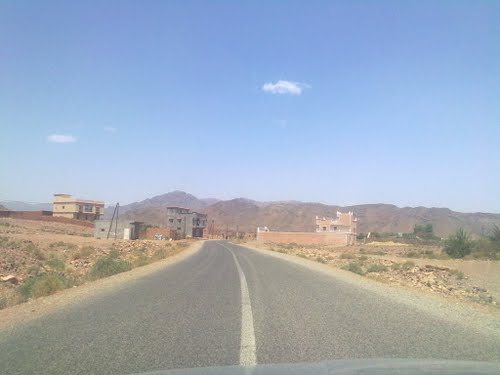 Tourza-Marruecos,(En árabe:تورزأت =Tourza,)es una pueblo en la región de Ouarzazate